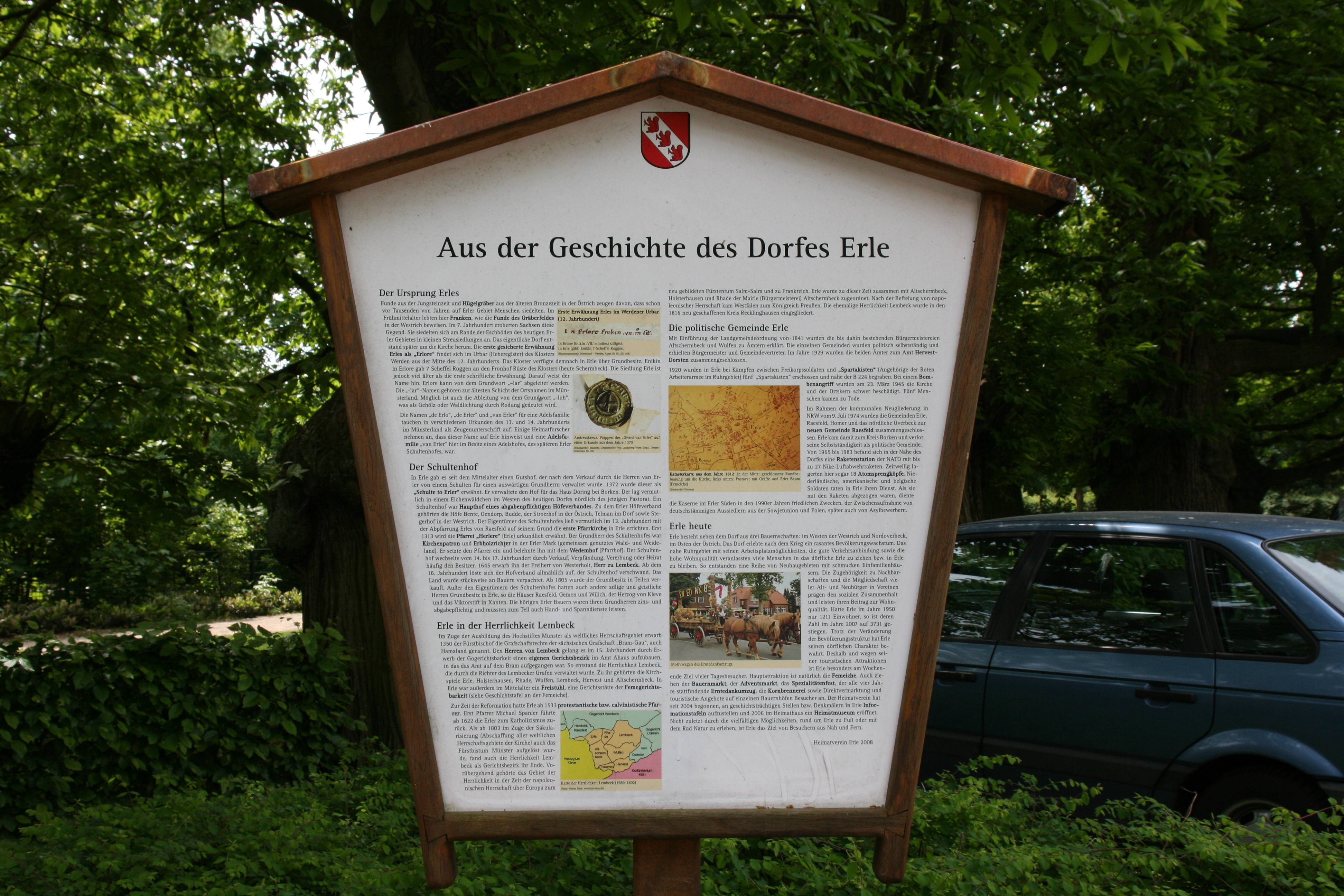 Informationen zur Geschichte des Dorfes Erle in Raesfeld-Erle (Standort: Ekhornsloh vor dem Kindergarten)